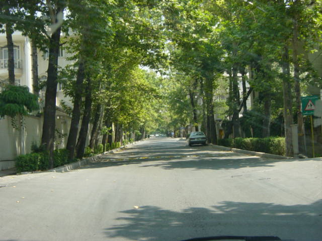 Rue Hedayat